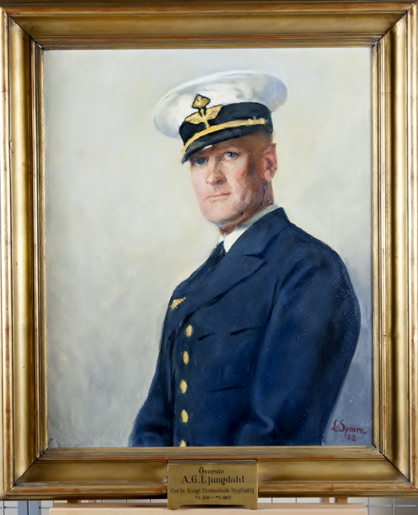 Porträttmålning på Överste Axel G Ljungdahl. Chef för Kungliga Västmanlands flygflottilj 1/1 1930- 30/6 1942. Målning skapad av L Sparre år 1942.